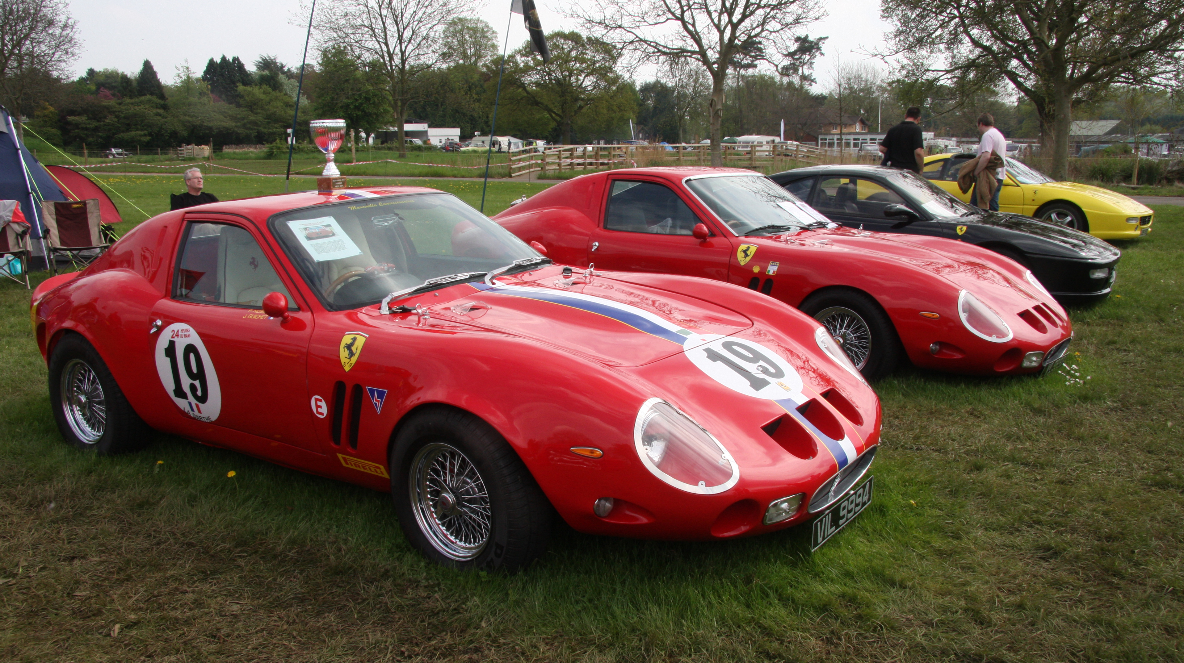 Ferrari 250 GTO replica